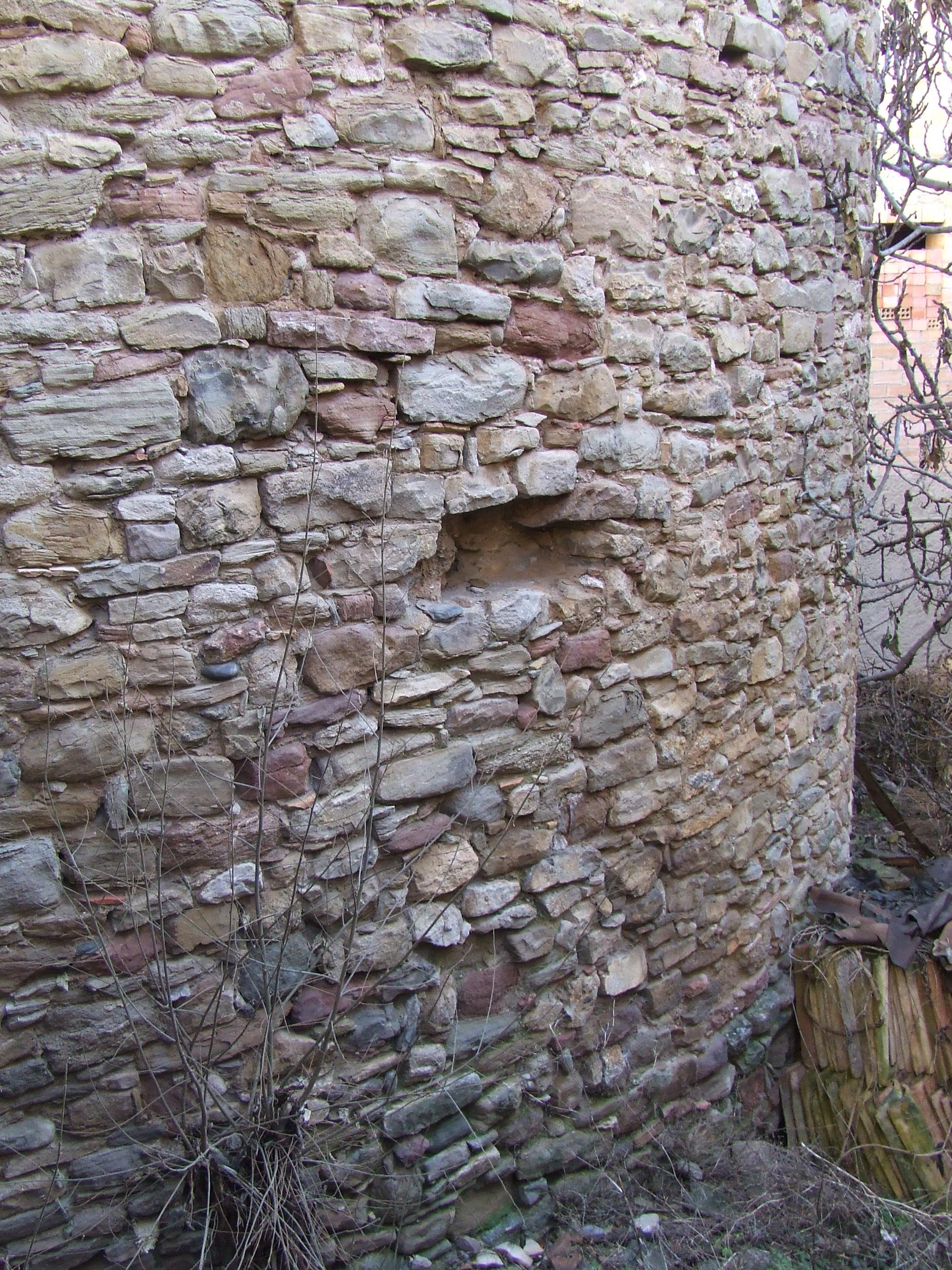 L'absis de Sant Joan Baptista de Palau de Noguera (Tremp, Pallars Jussà)